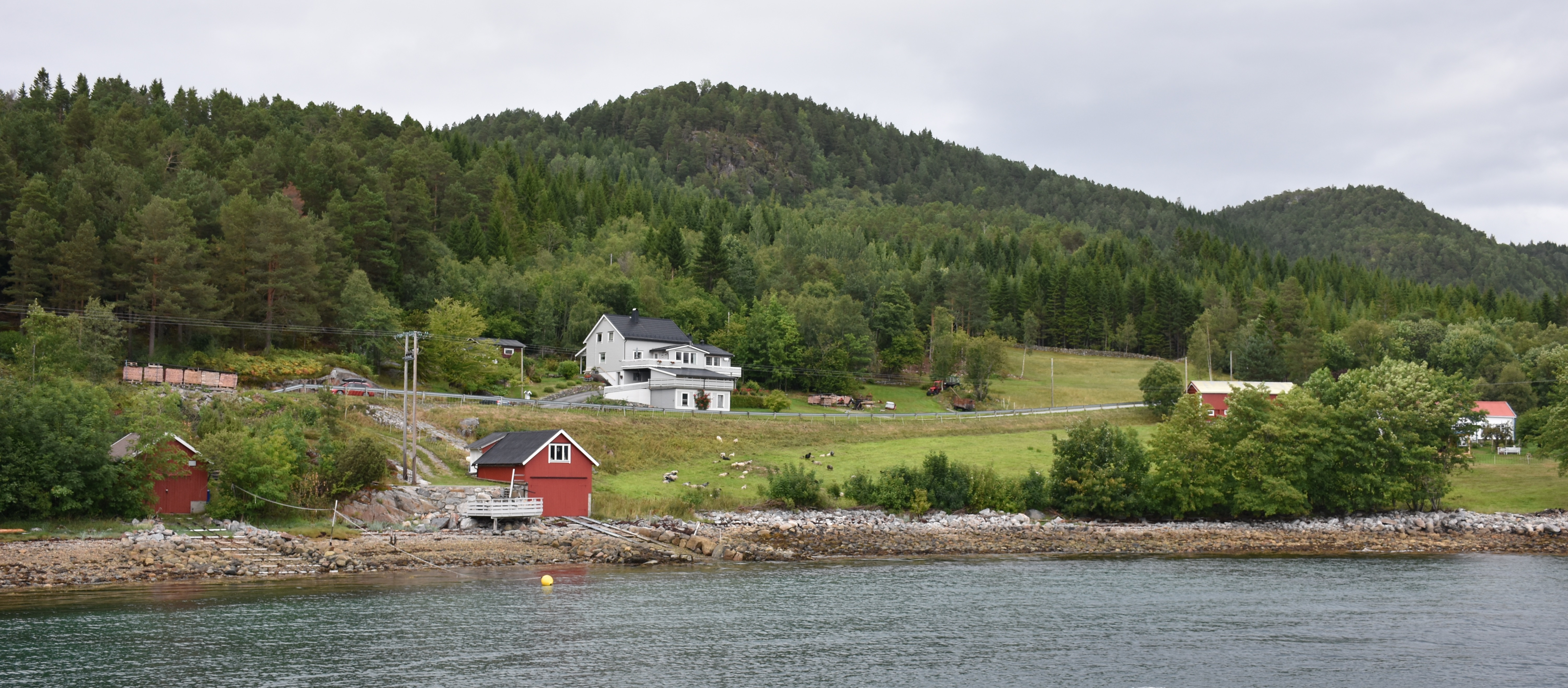 Langfjordvegen (fylkesvei 195) nordøst for Sølsnes fergekai